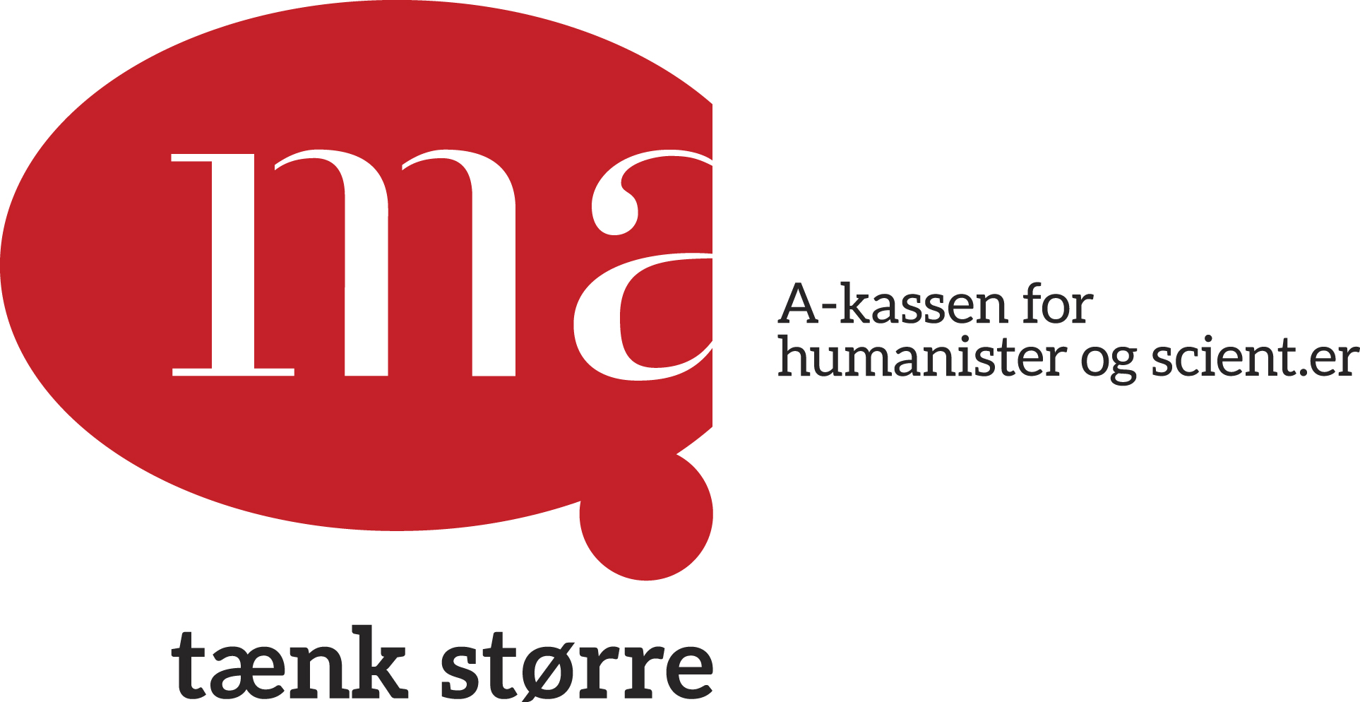 Magistrenes A-kasses logo